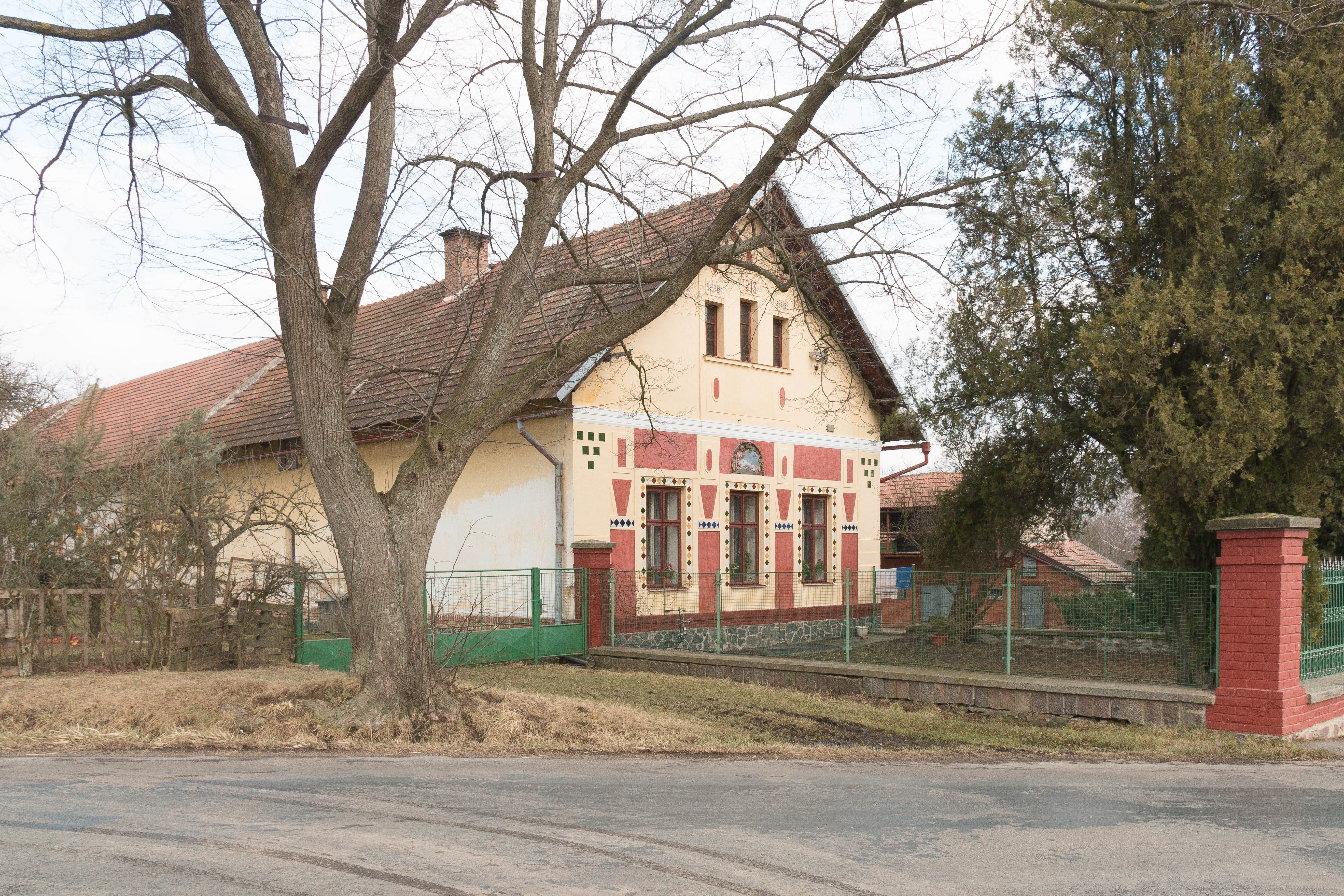 Loučky průčelí čp. 3